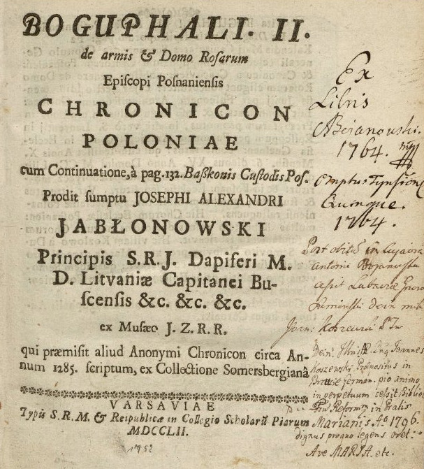 Pierwsze polskie wydanie Kroniki wielkopolskiej, z roku 1752. Jako autor wskazany jest biskup poznański Bogufał II.